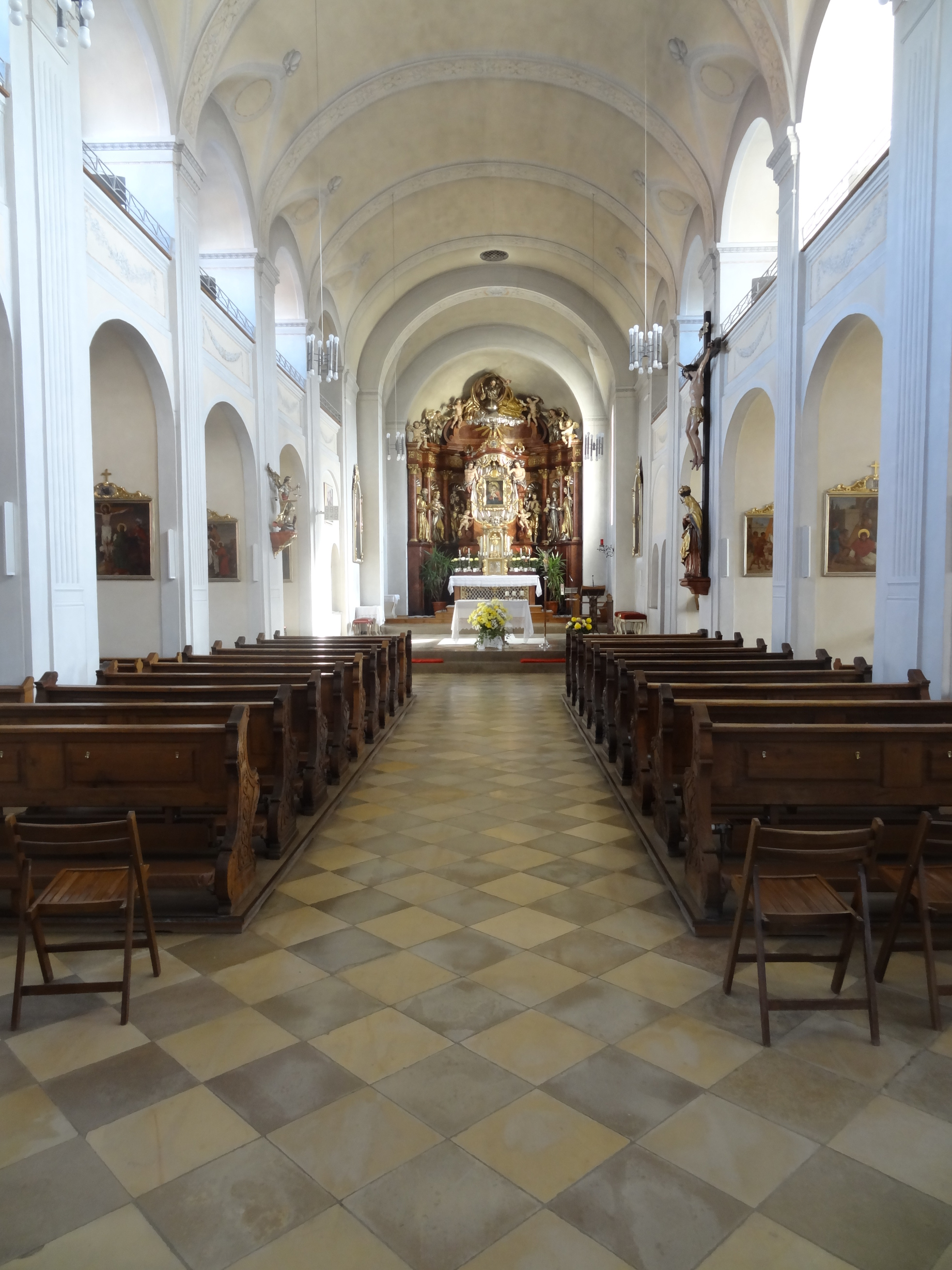 Das Hauptschiff der neuromanischen Basilika